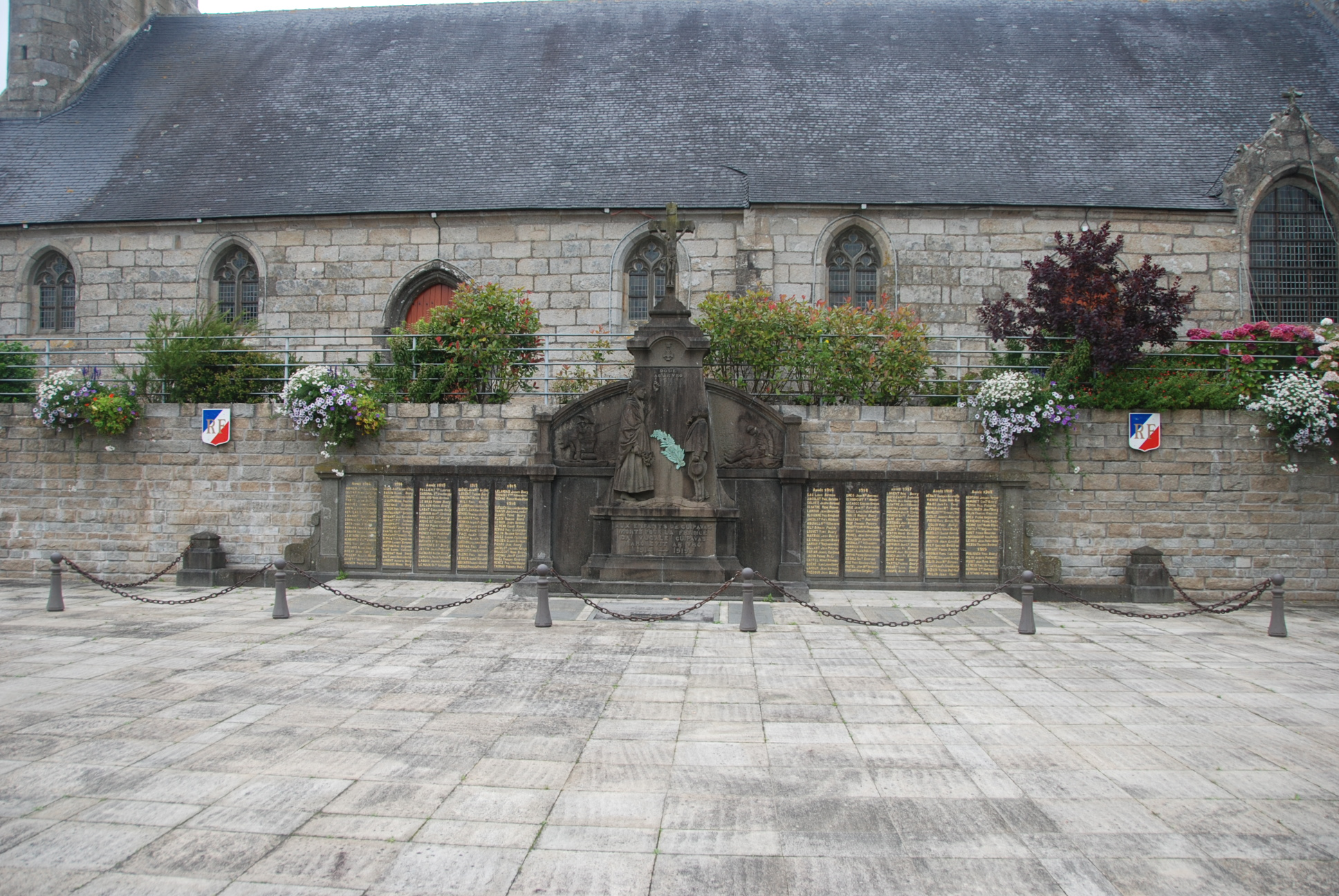 Monument aux morts - Guipavas-29